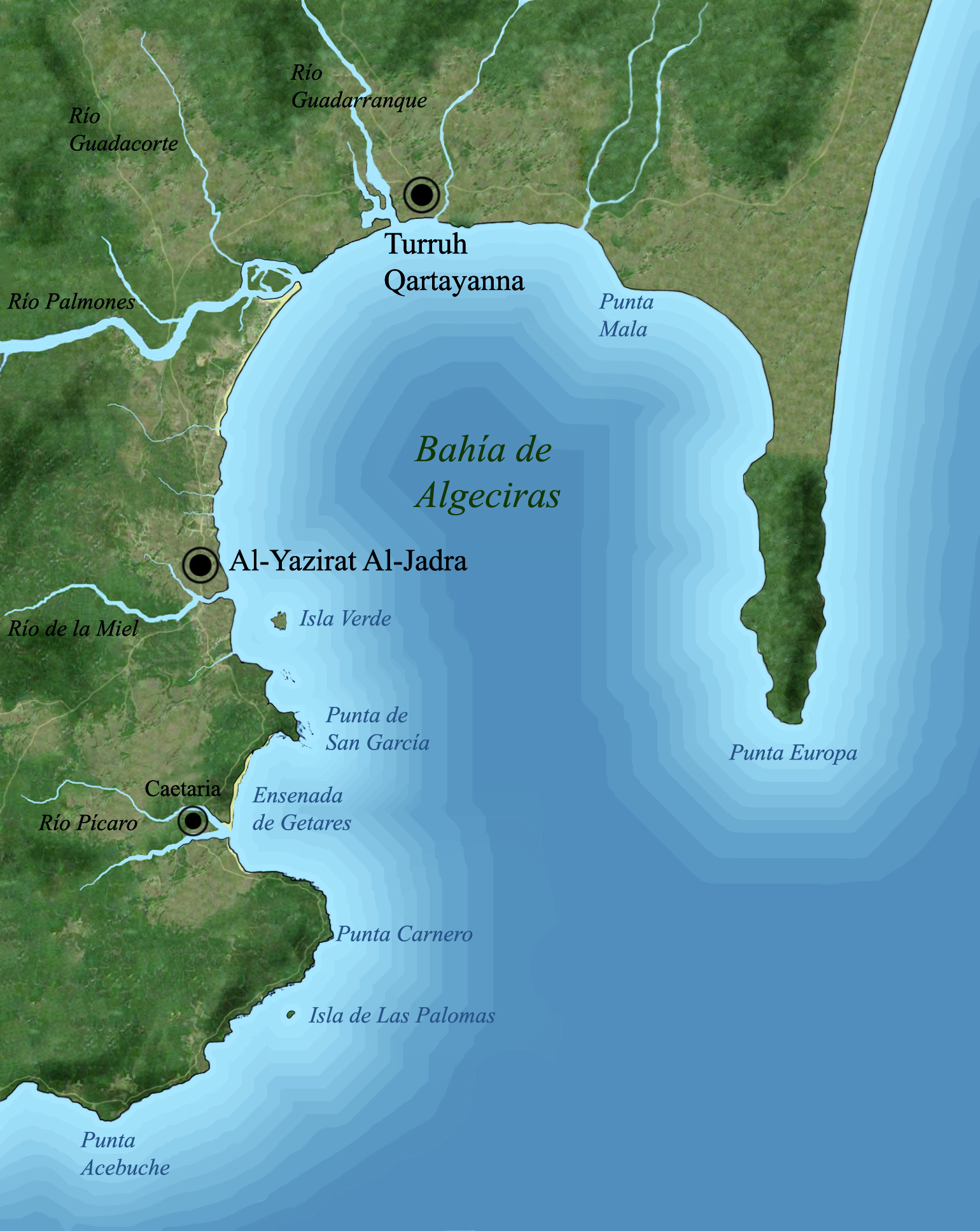 Mapa de la Bahía de Algeciras